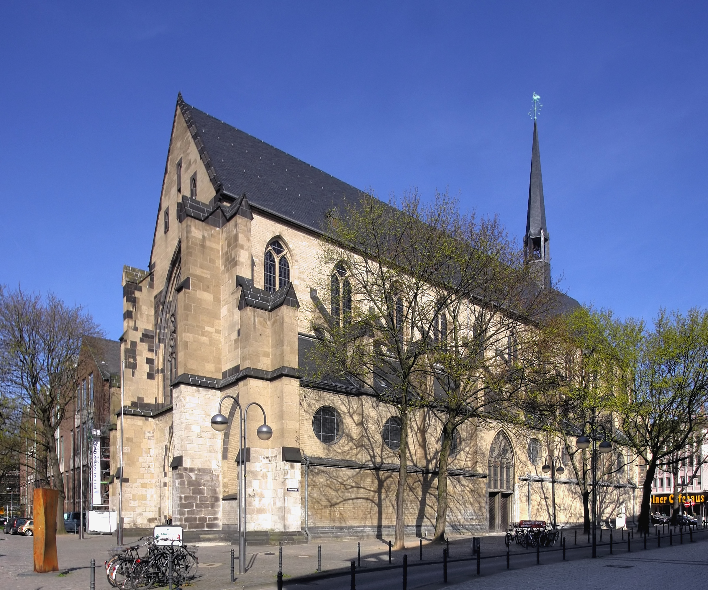 Minoritenkirche Köln im frühen Frühling. Ansicht von Südwesten This is a photograph of an architectural monument.